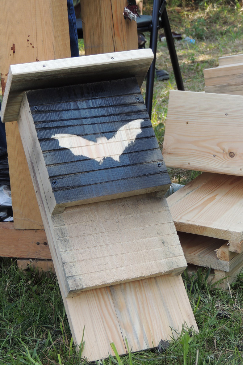 Домік для кажана, сканструяваны падчас майстар-класаў АПБ падчас Ночы кажаноў.